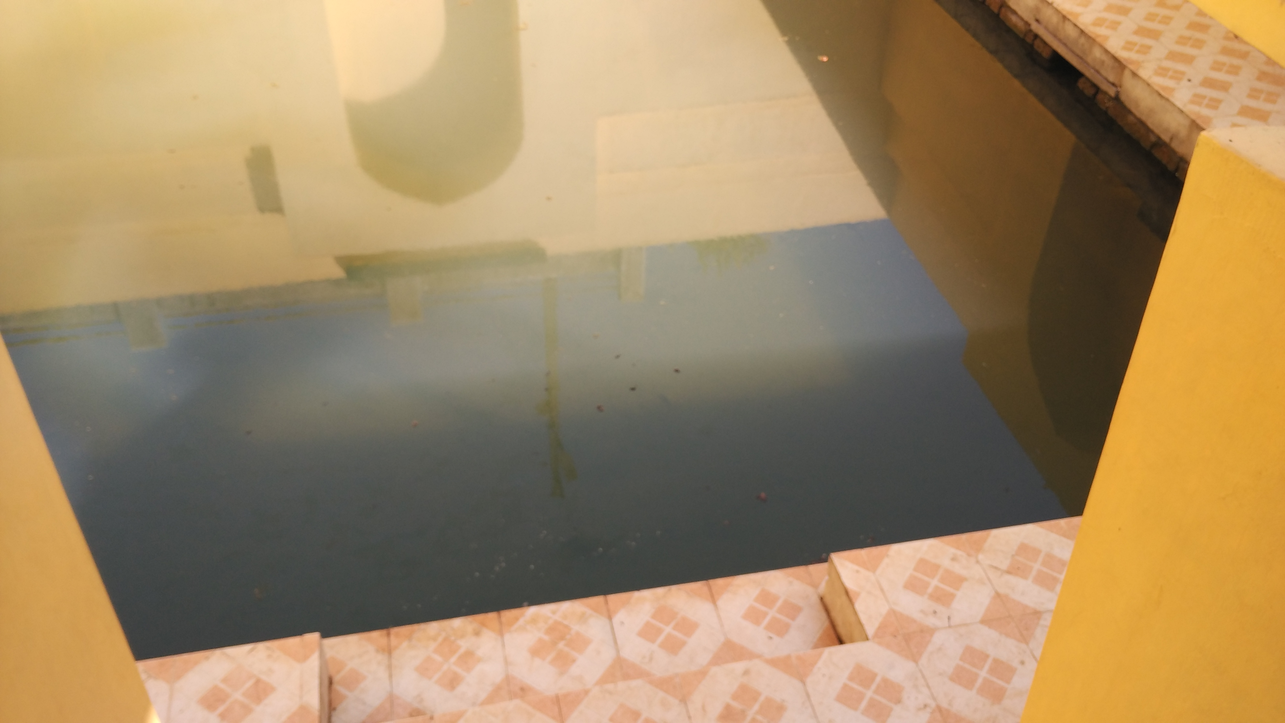 ಕನ್ನಡ: ವರದಾನದಿಯ ಮೂಲಸ್ಥಾನ